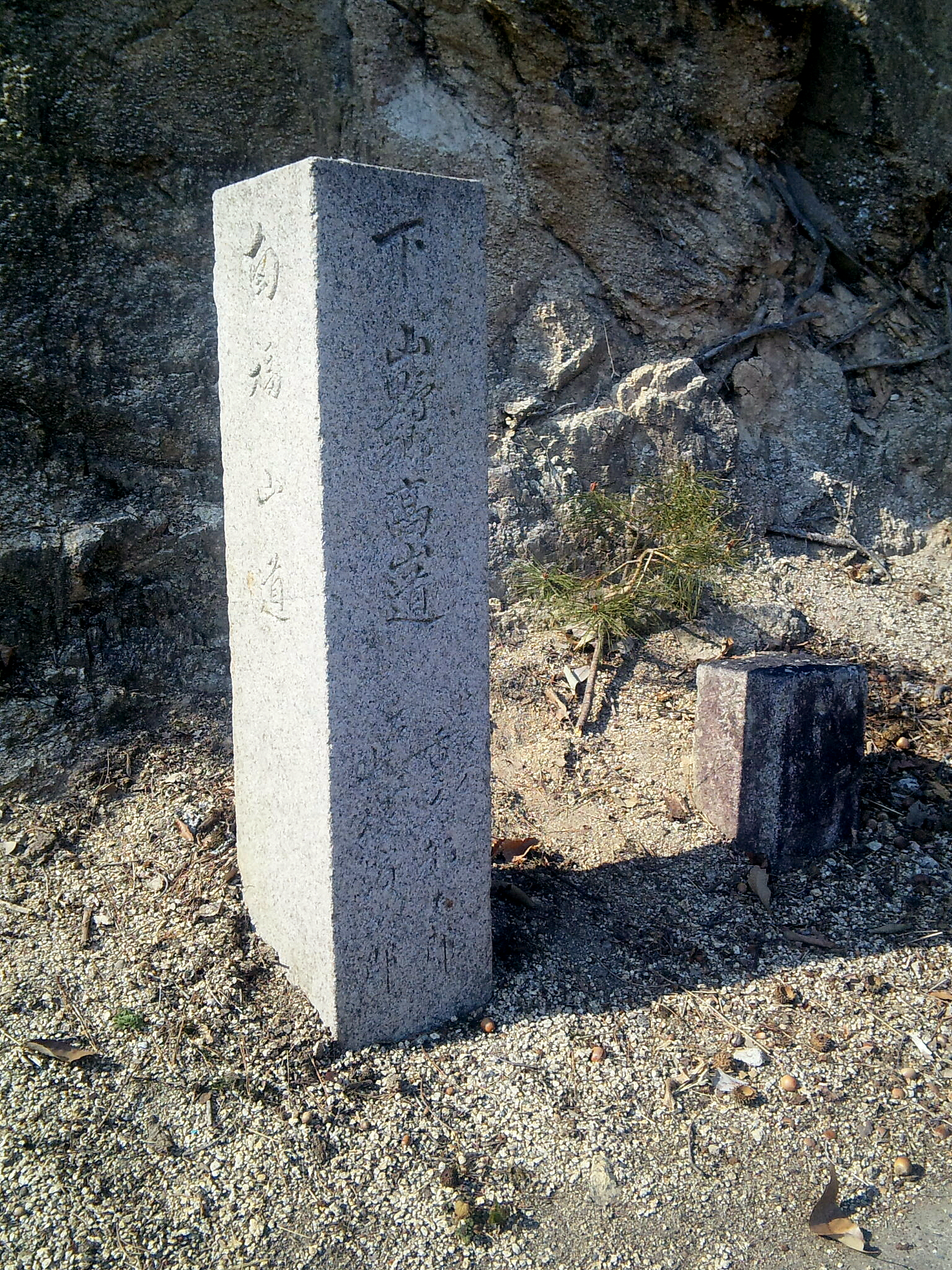 長右衛門坂（ちょうえもんざか）の登口に残る道標。旧平川往来の古い道筋（長右衛門坂越え）と、新しい道筋（堀切峠越え）がここで分岐。道標には「下： 山野郷 高山道」とあり、現在の広島県福山市山野町山野および岡山県高梁市川上町高山へは新しい道筋を案内している。 （広島県福山市加茂町粟根）